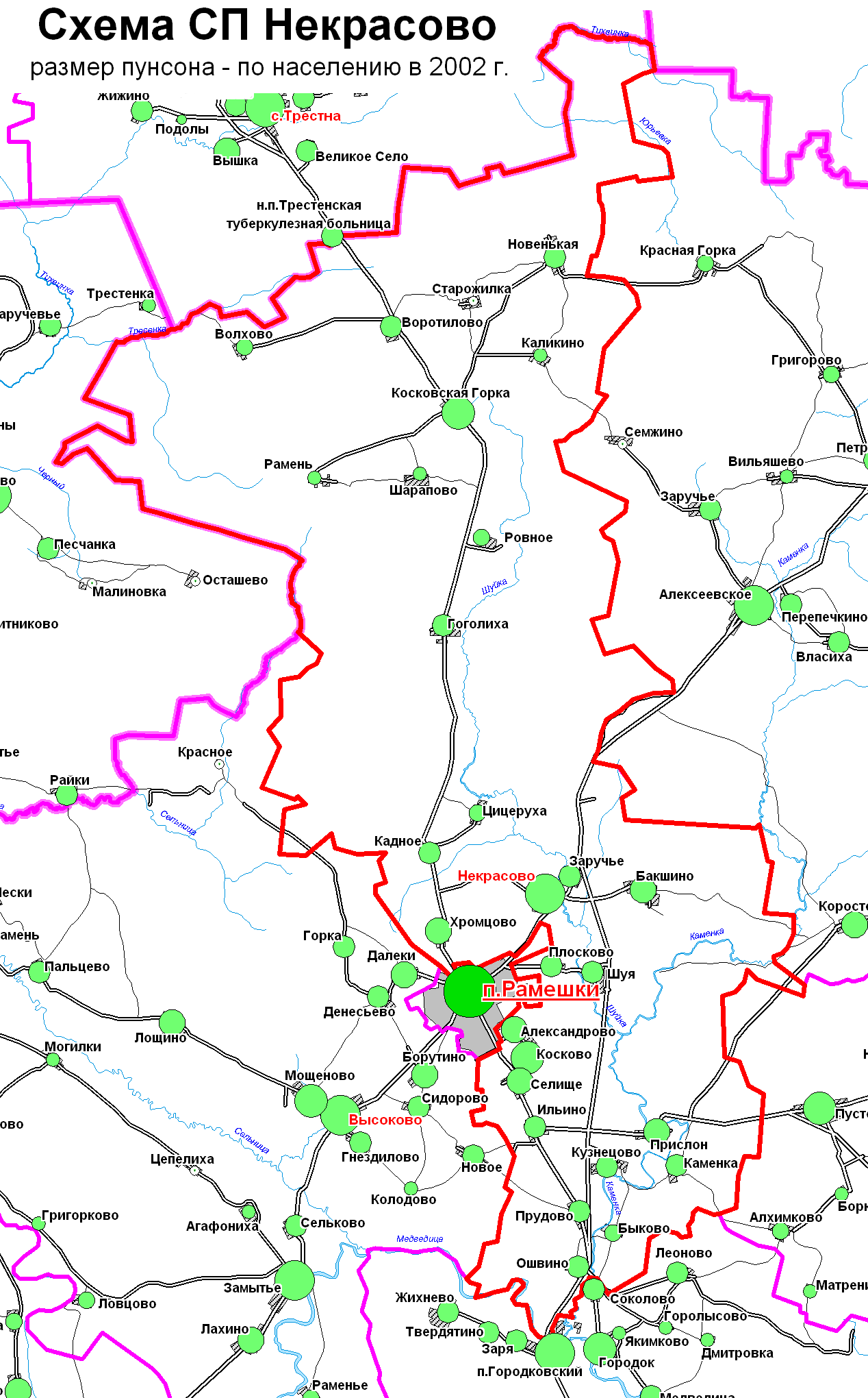 Схема сп Некрасово Тверской области